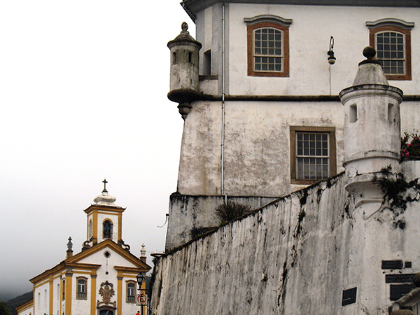 Palácio dos Governadores e igreja em Ouro Preto, Brasil.